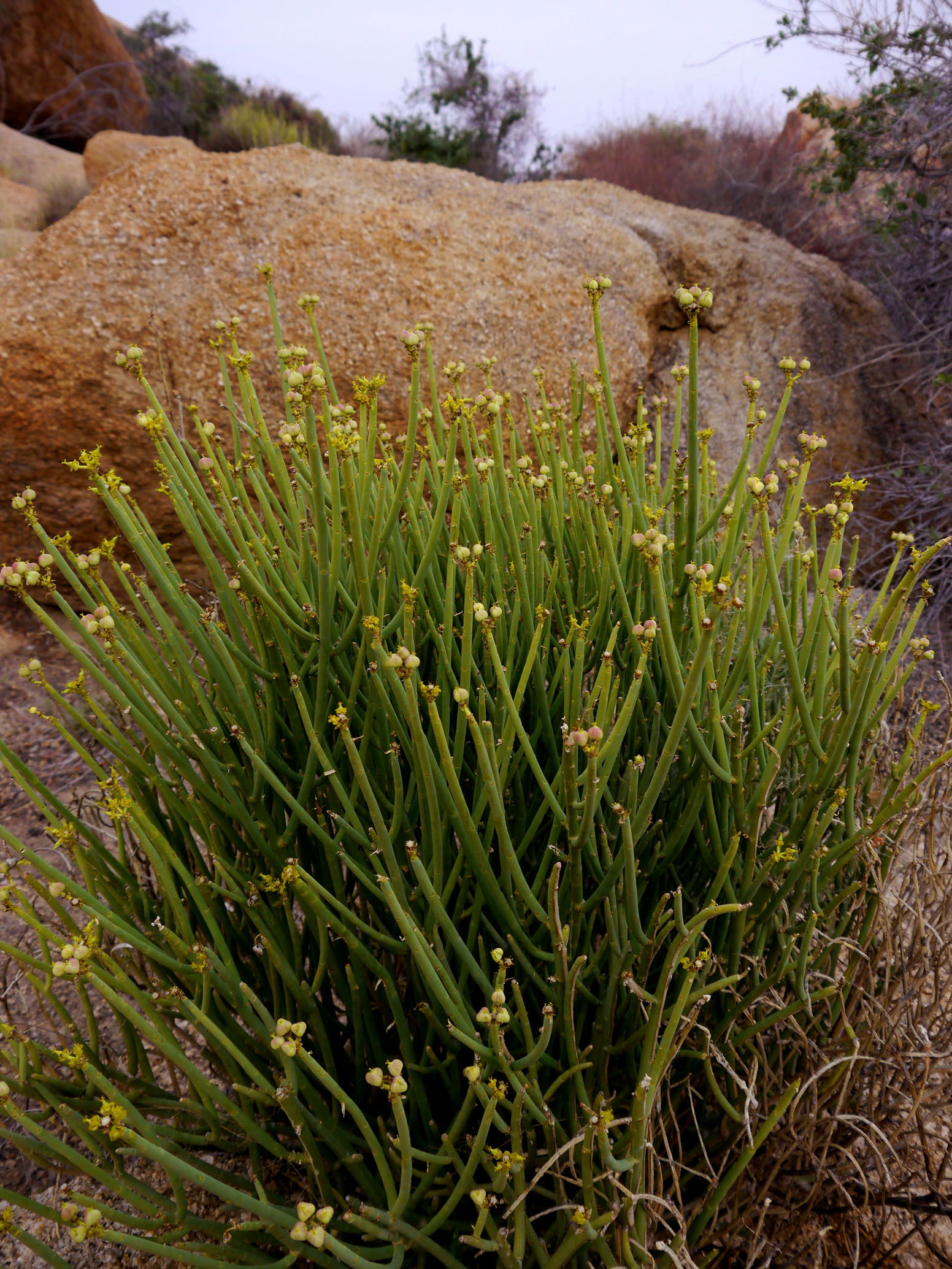 Euphorbia gariepina en Sesriem (Namibia).